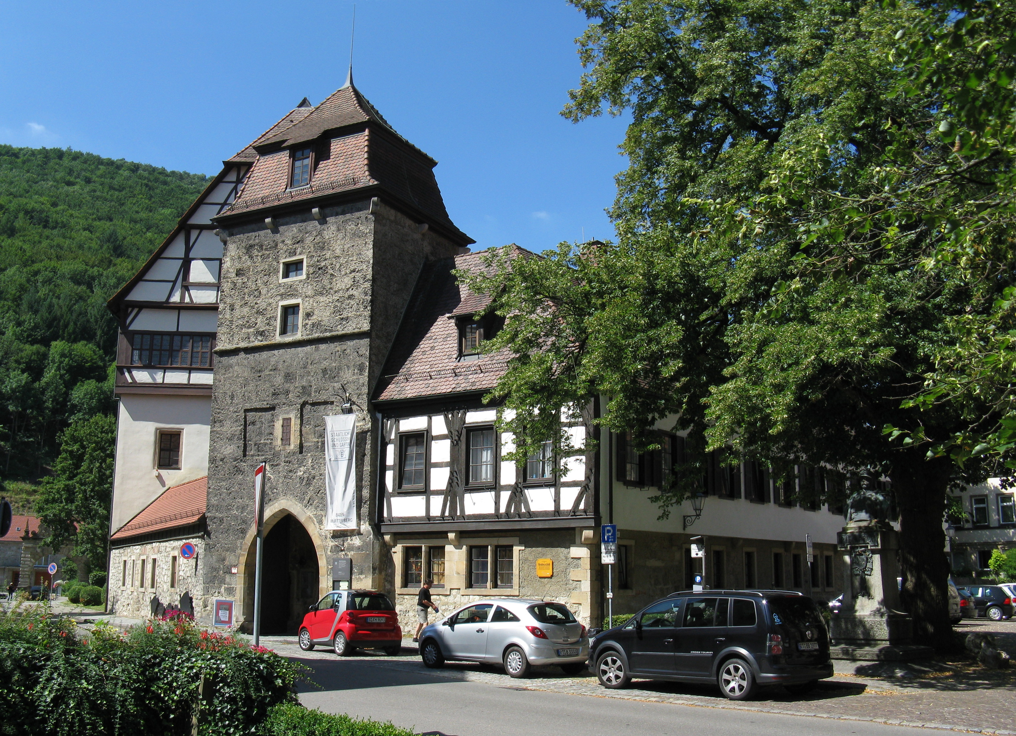 Schloß Urach in Bad Urach (Baden-Württemberg)